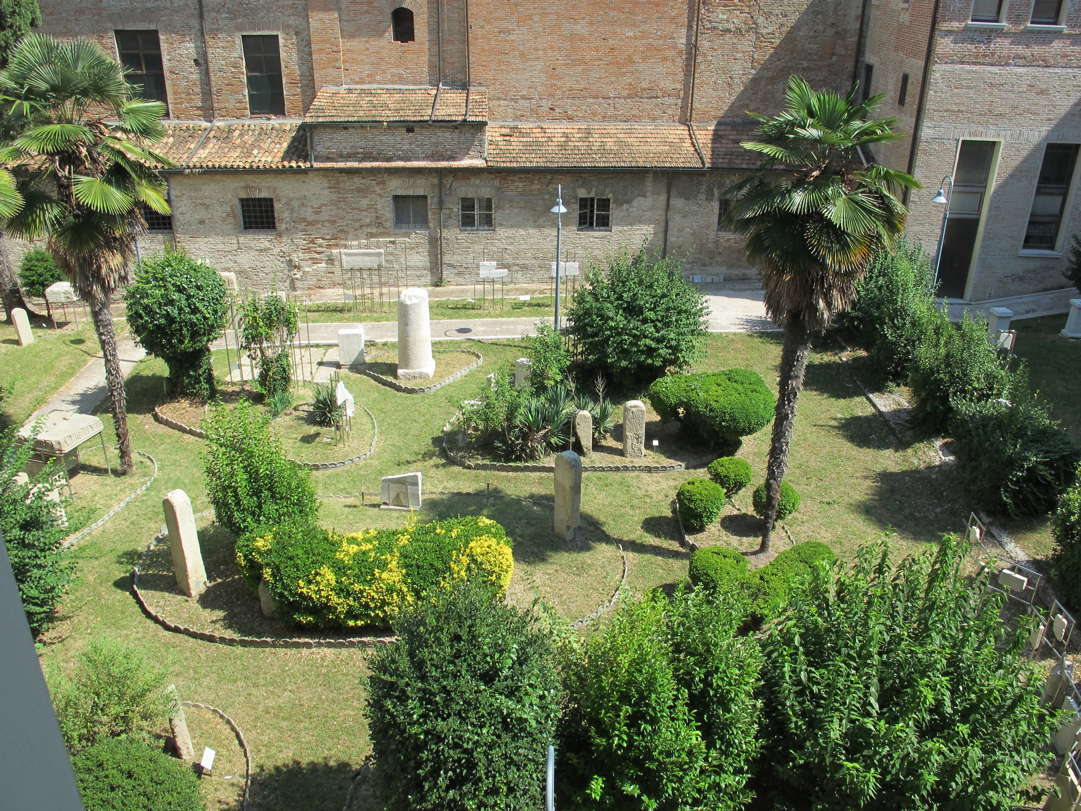 Museo della città di Rimini, cortile